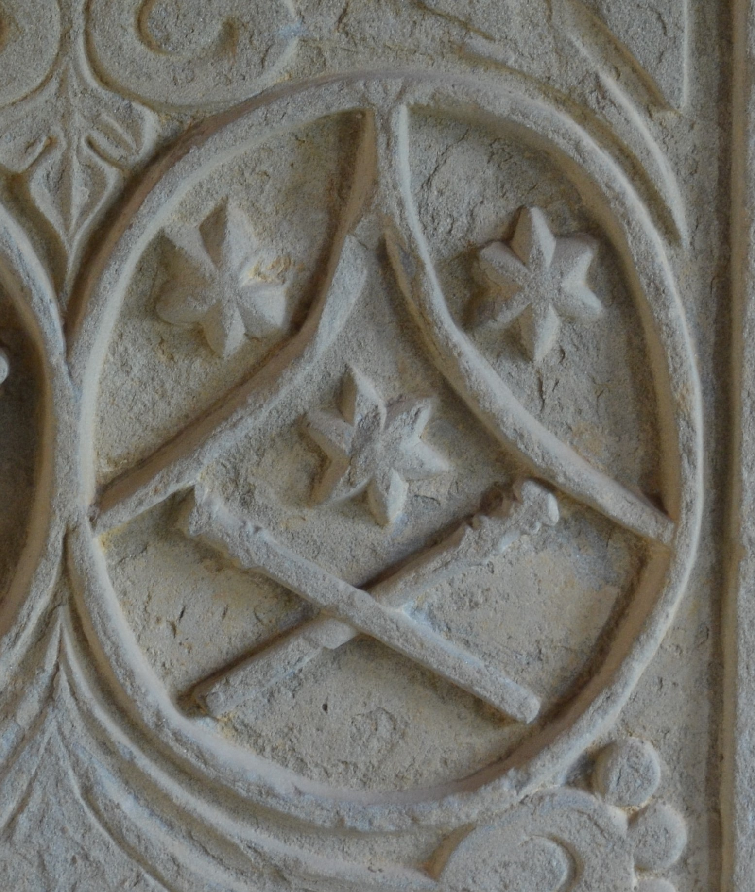 Kirche Zimmerwald, Grabmal Neeser-Steck, Wappen Steck